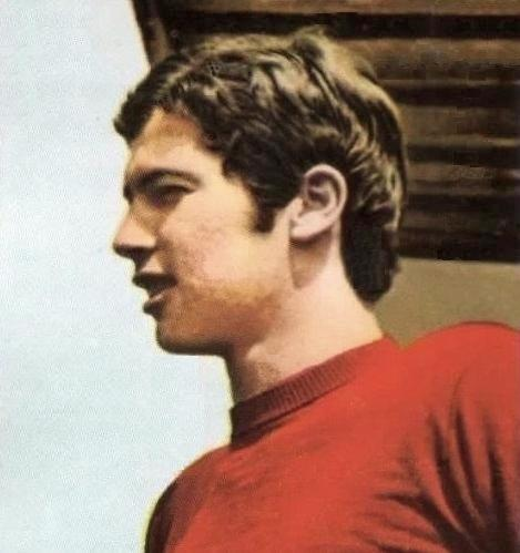 Émerson Leão (1970), 'Mexico 70 - World Cup Story', Panini figurina.